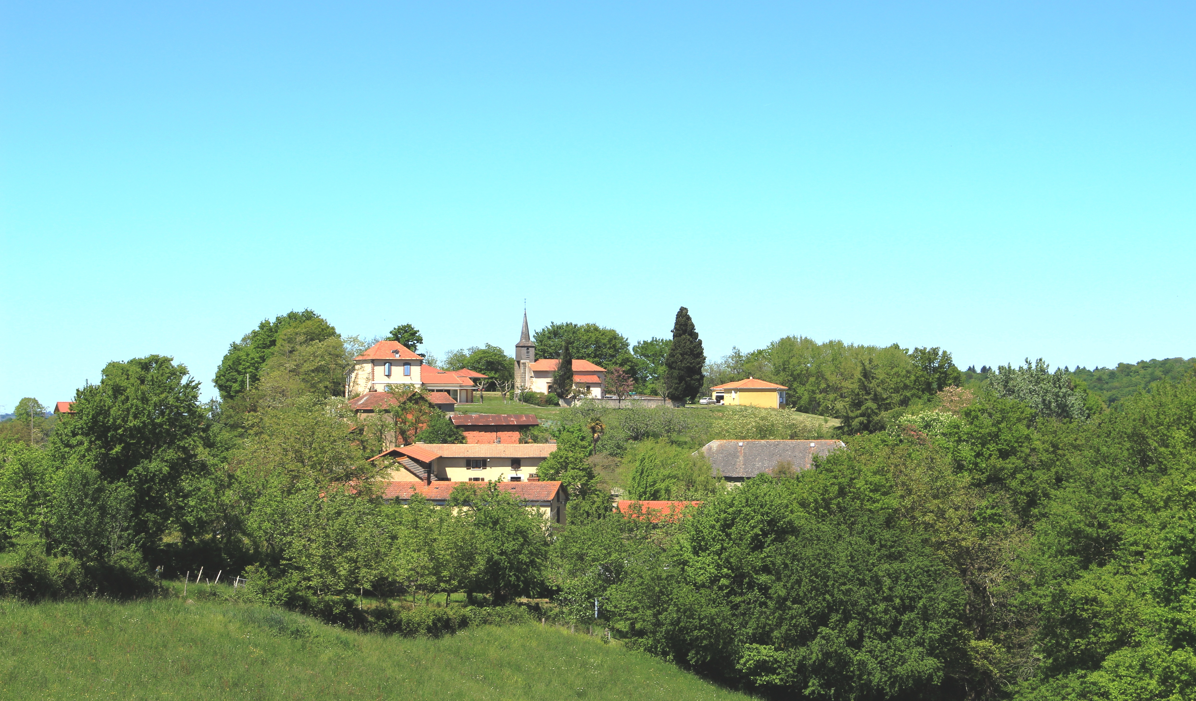 Bouilh-Devant (Hautes-Pyrénées)